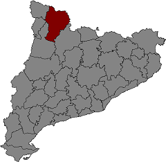 Localització del Pallars Sobirà